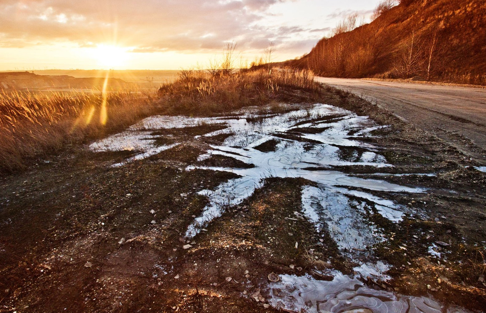 Sunlevo (aŭ ĉu eble sunfalo?) ĉe vojrando kun frostiĝintaj pneŭflakoj.